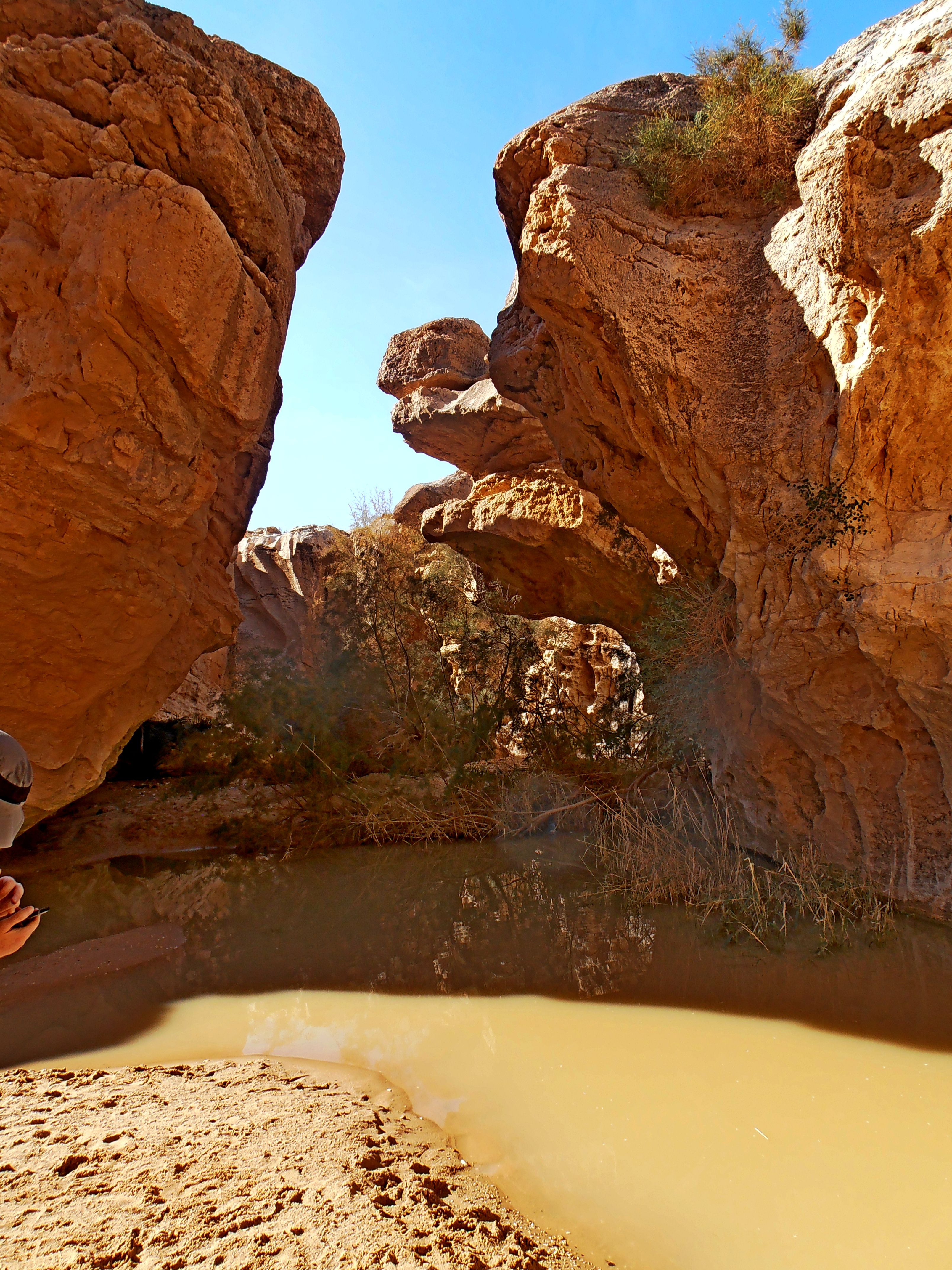 Ein Yorke'am; Negev, Israel עין ירקעם; הנגב